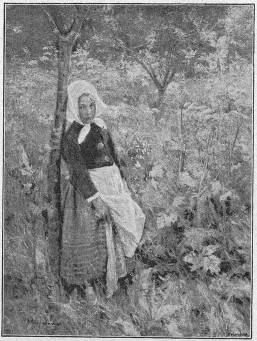 Herbst